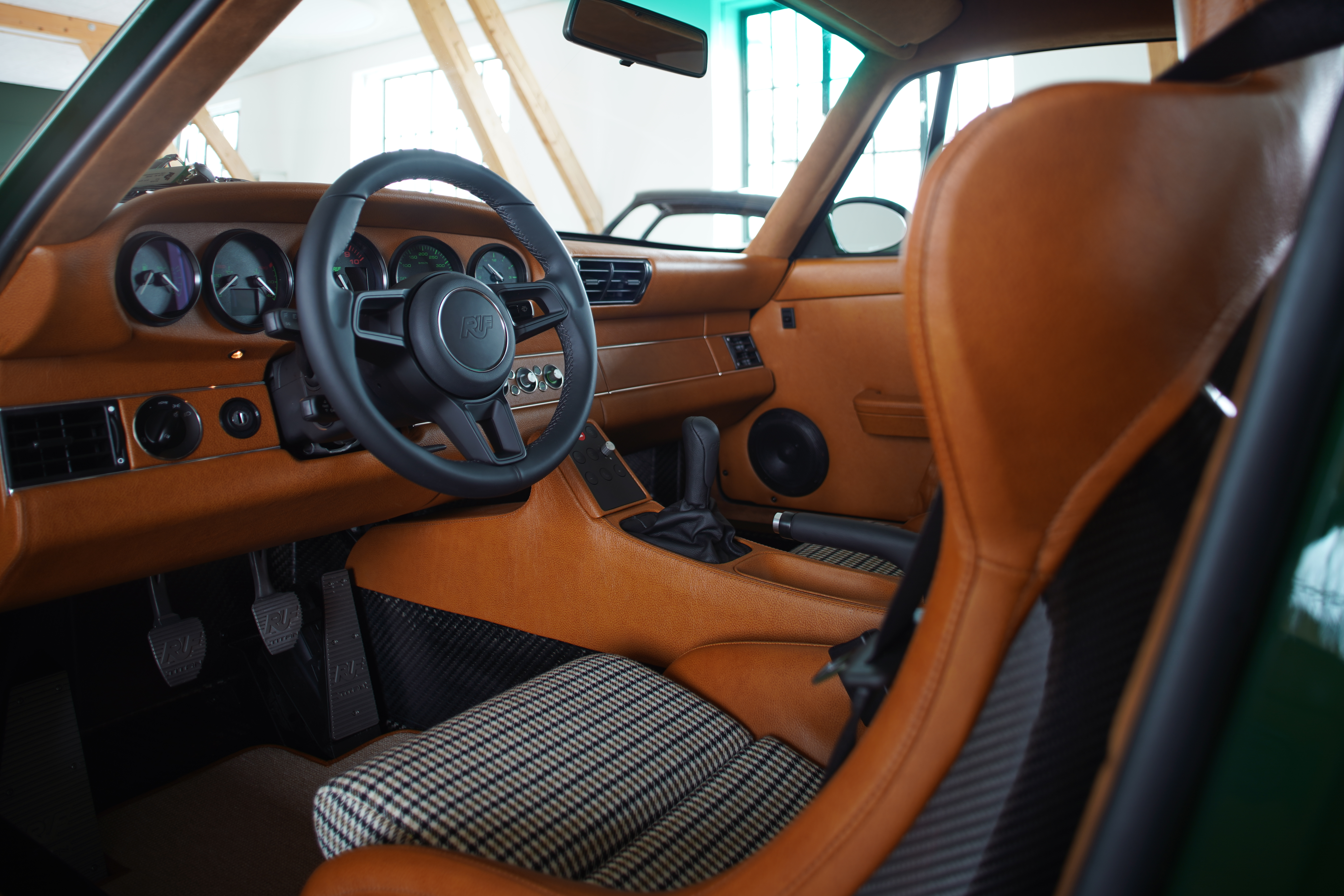 2020 RUF SCR